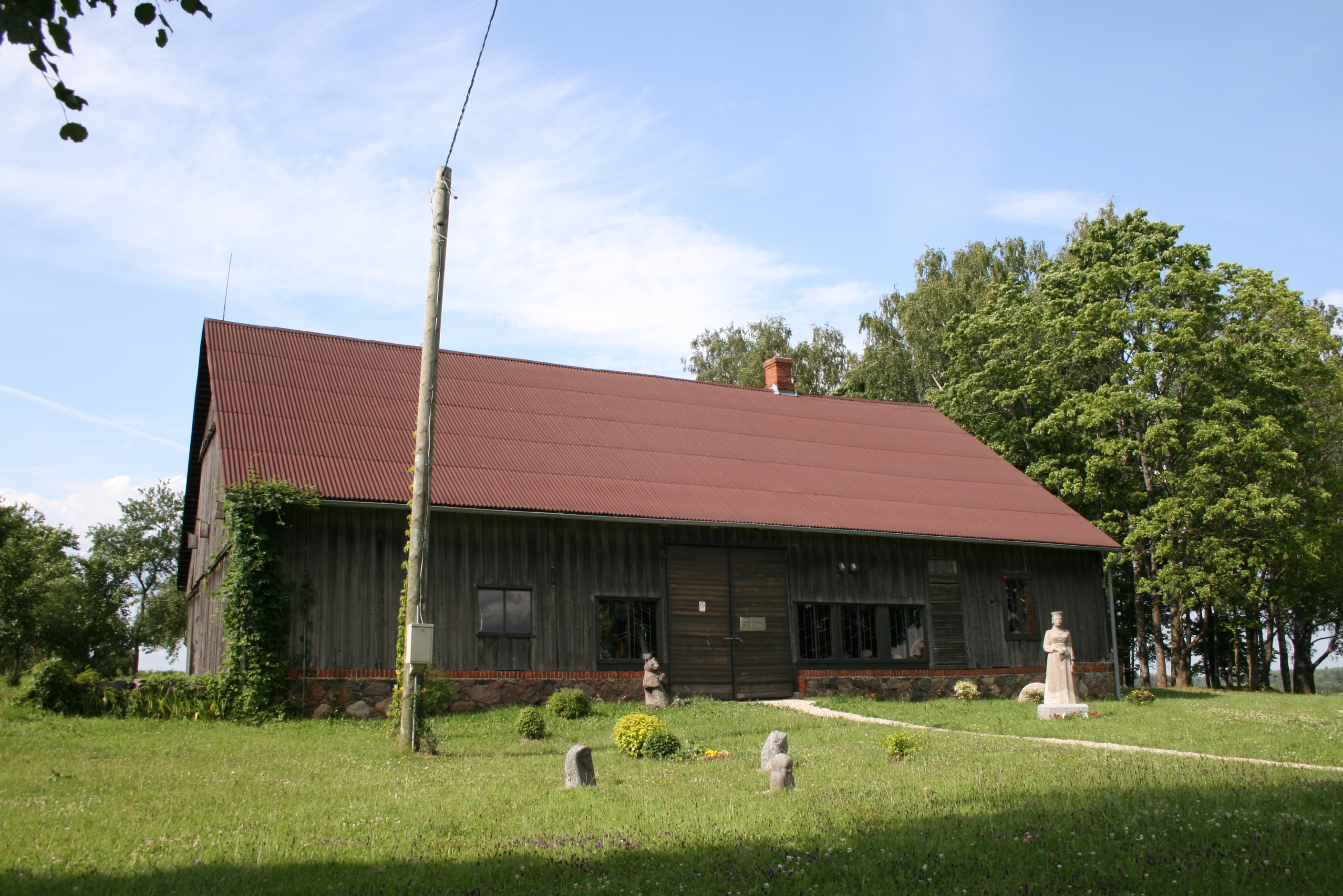 V. Jakabson's Museum